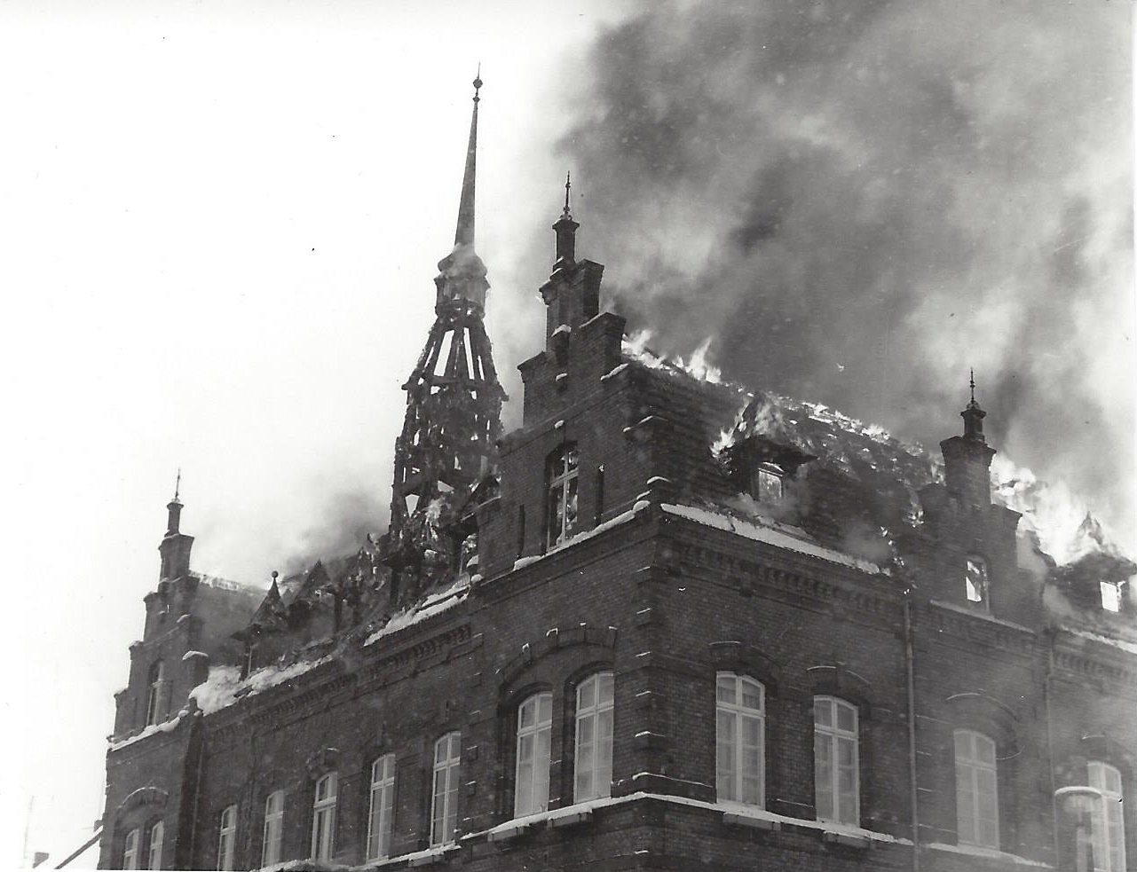 Brennender Dachstuhl des Rathauses von Plau (Mecklenburg)